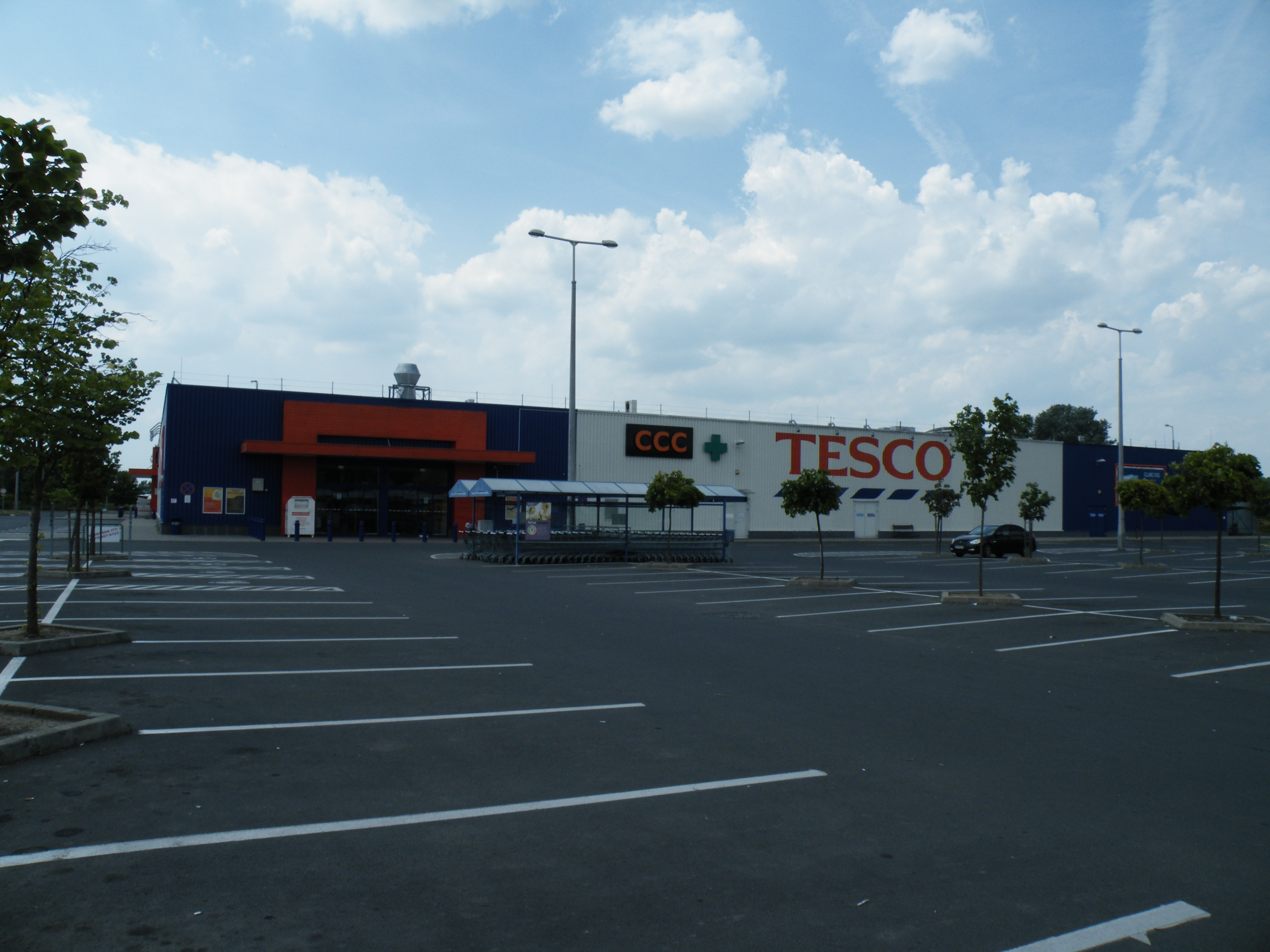 Tesco áruház Balassagyarmaton